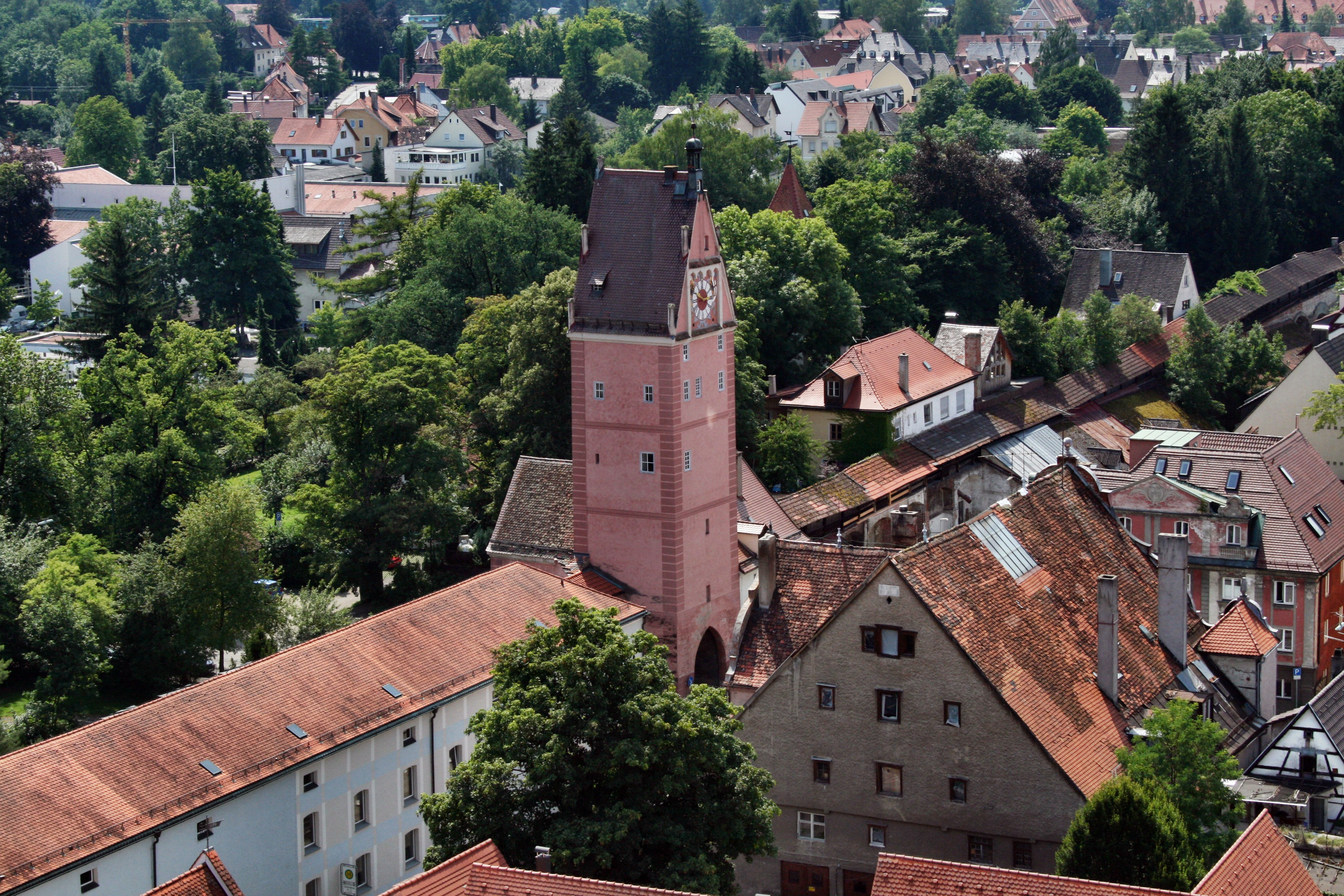 Das Kemptertor in Memmingen (1397 erbaut). Fotografiert vom Kirchturm der Frauenkirche.